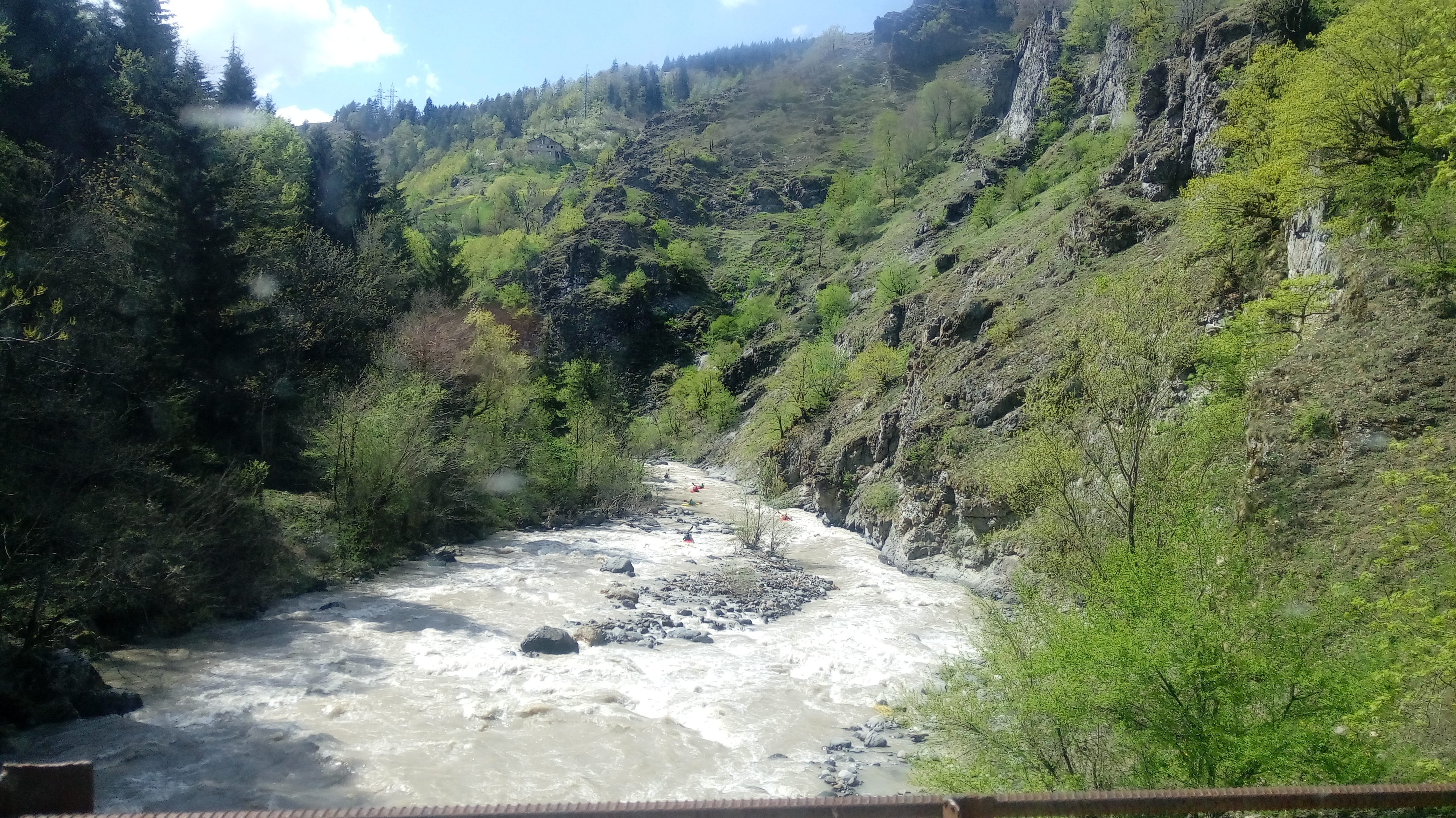 მდინარე აჭარისწყალი